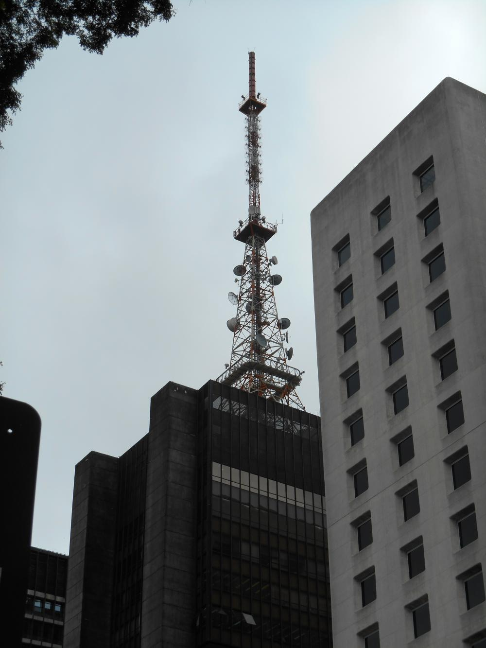 Torre Grande Avenida da RecordTV